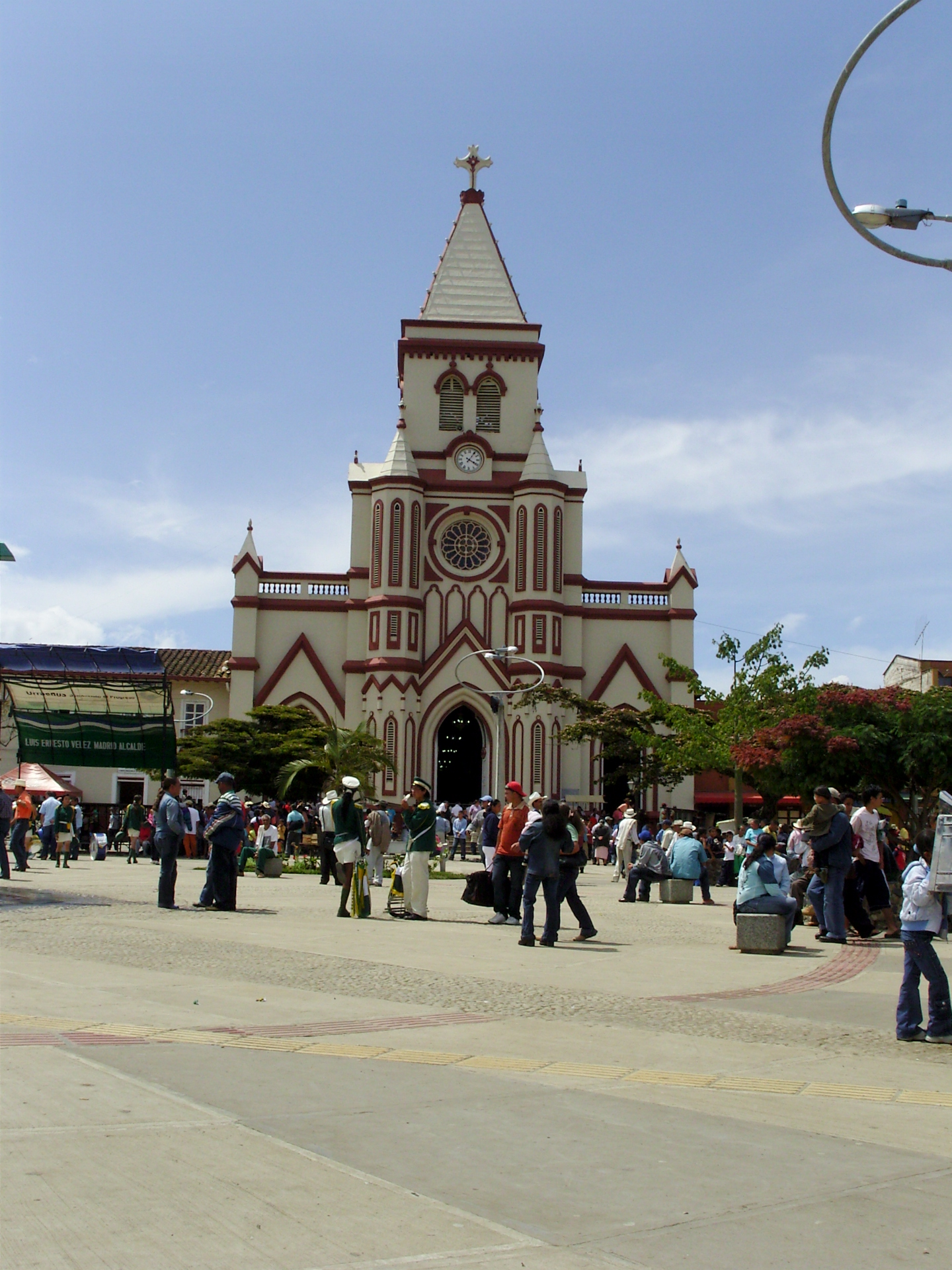 Parque e iglesia de Urrao.